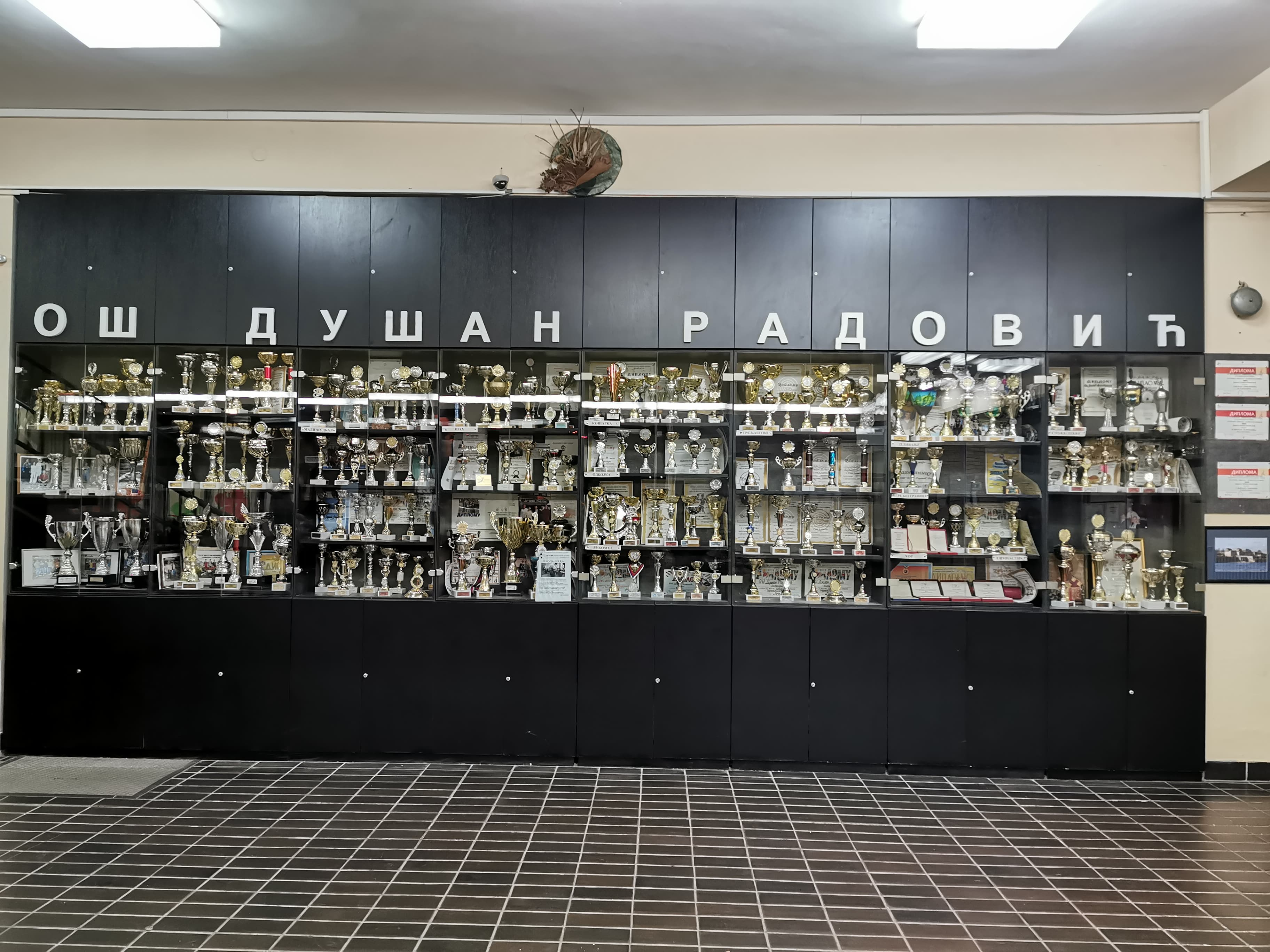 ОШ Душан Радовић Ниш Пехари